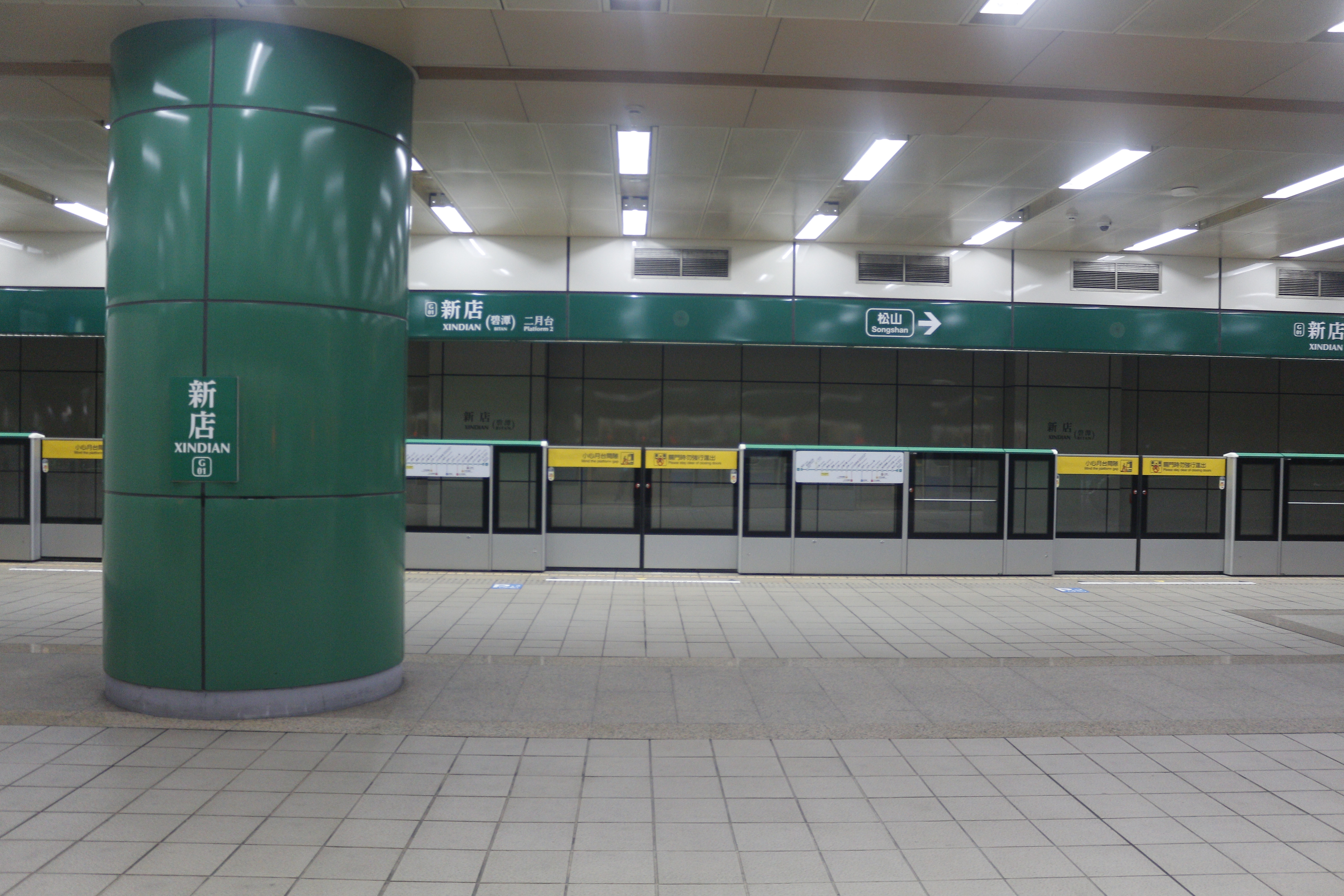 新店站月台